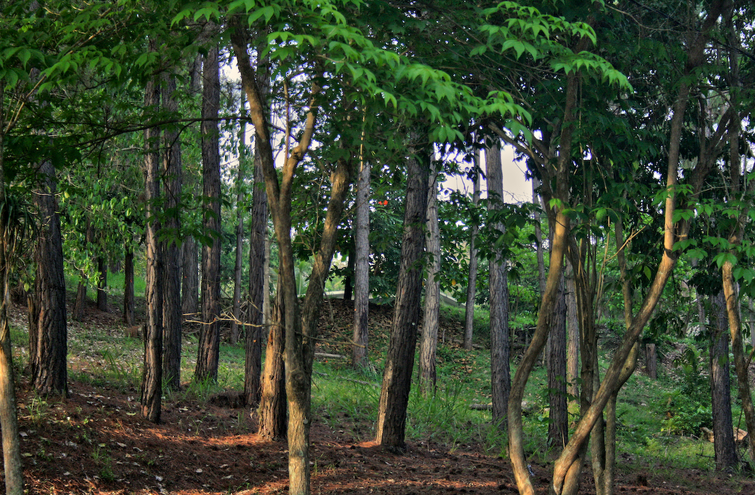 Arboles en la Universidad de Puerto Rico Recinto de Cayey